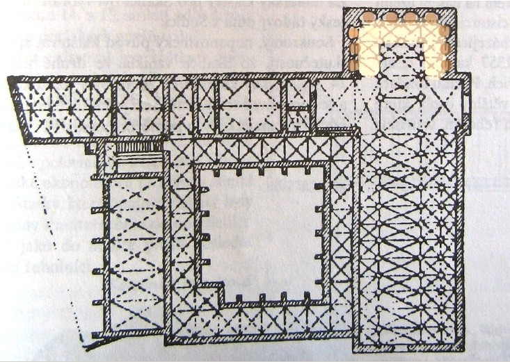 Plán kláštera na Zbraslavi